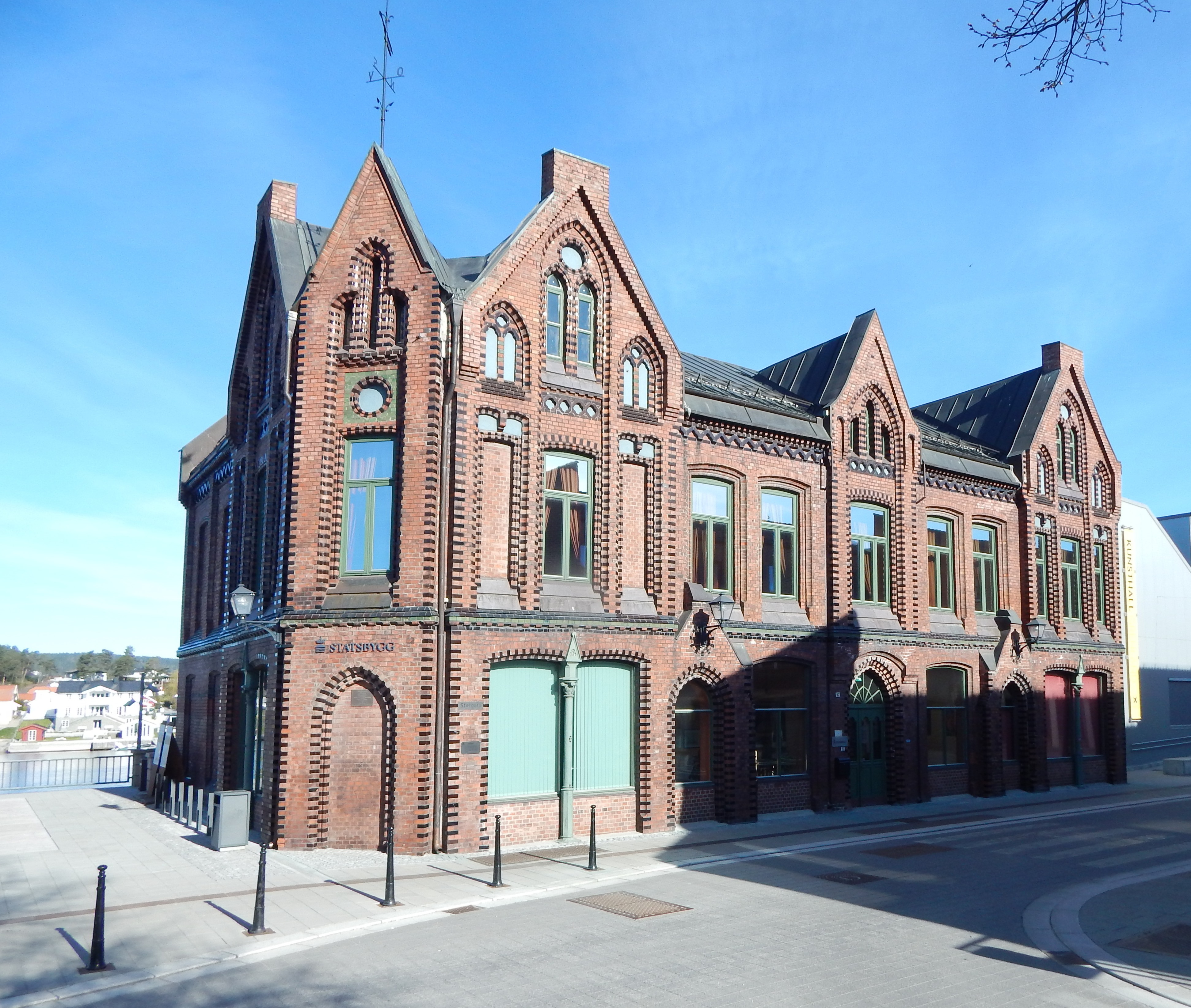 Porsgrunn tollbod